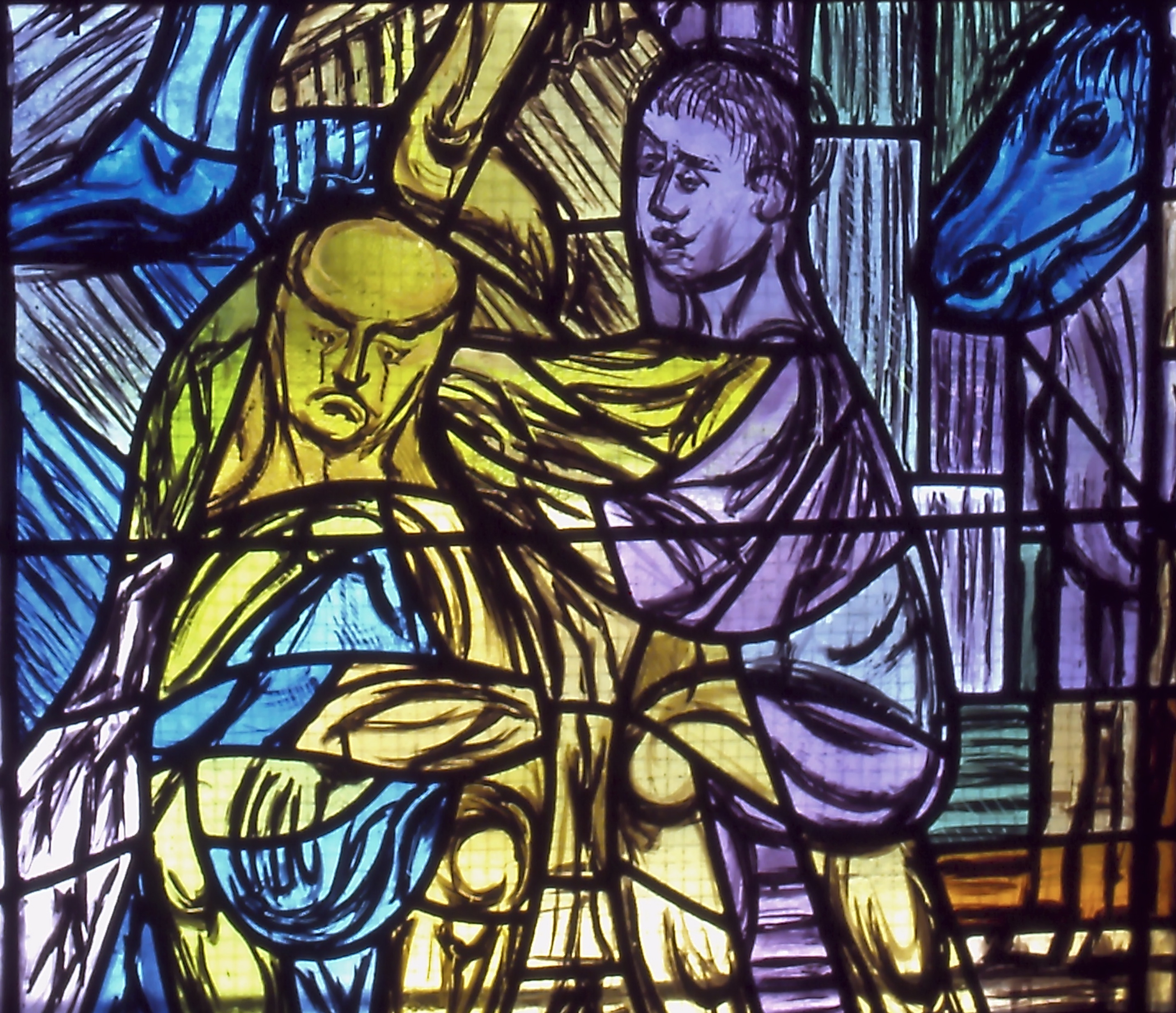 Photo de vitrail église St Martin d'Ury